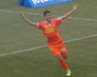 Fernando Cornejo Miranda Celebra un gol por Cobreloa en el año 2015, válido por la tércera fecha del torneo Primera B.